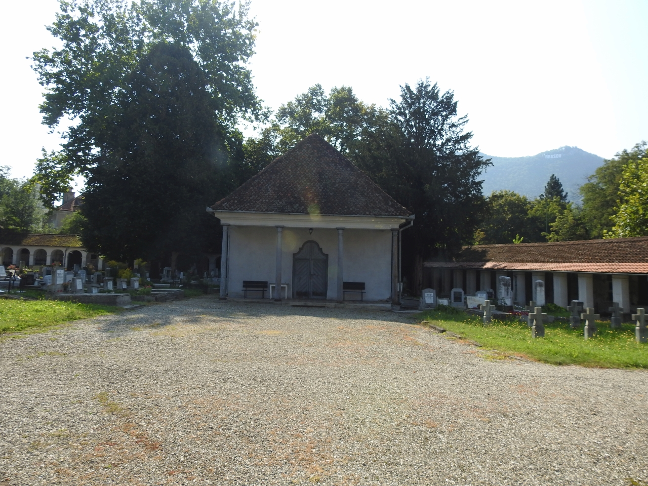 Capelă 02